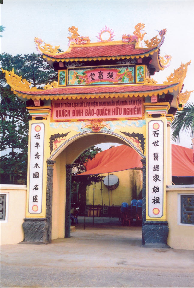 Nơi thờ hai cụ Quách Đình Bảo và Quách Hữu Nghiêm. Là di tích lịch sử văn hóa cấp quốc gia.